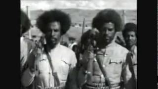 Guerriglieri etiopi ("arbegnuocc") durante l'occupazione italiana in Africa orientale